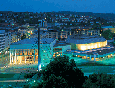 ConcressCentrum Pforzheim mit Stadthalle am Waisenhausplatz